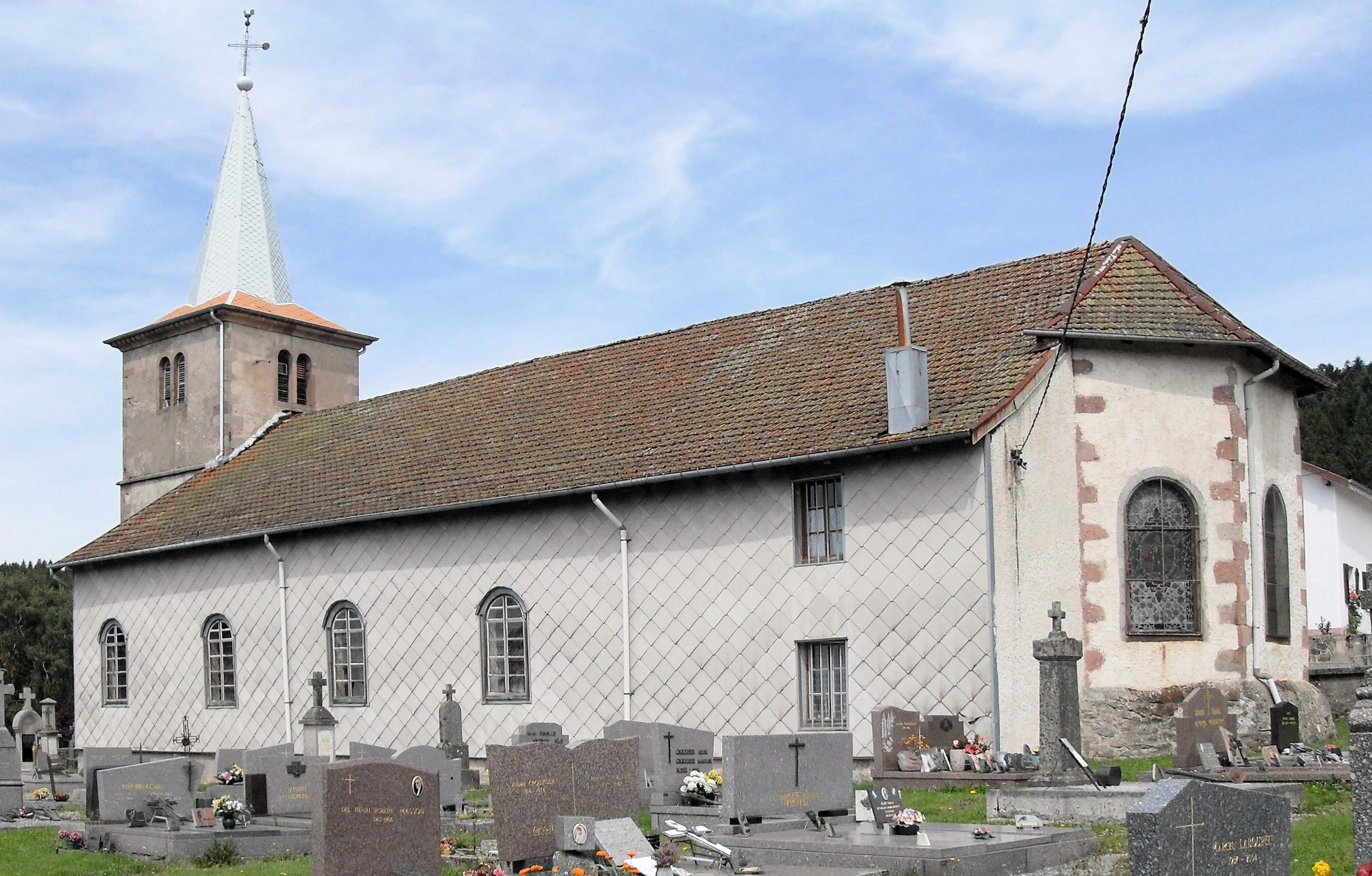 L'église Saint-Nicolas et Saint-Gérard à Liézey